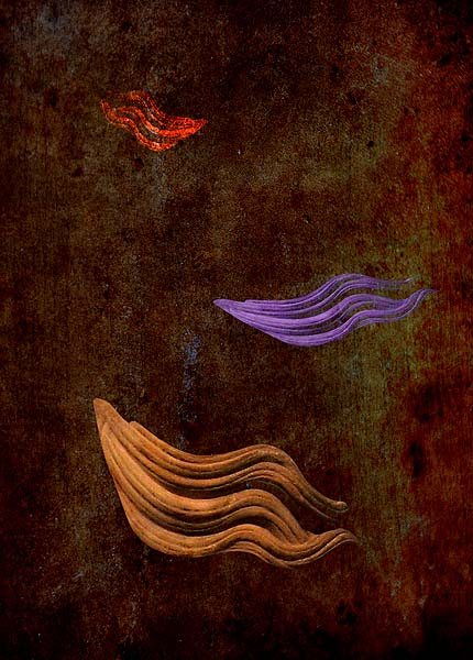 Benedek Imre (Budapest, 1972. február 22.) alkalmazott grafikus alkotása.